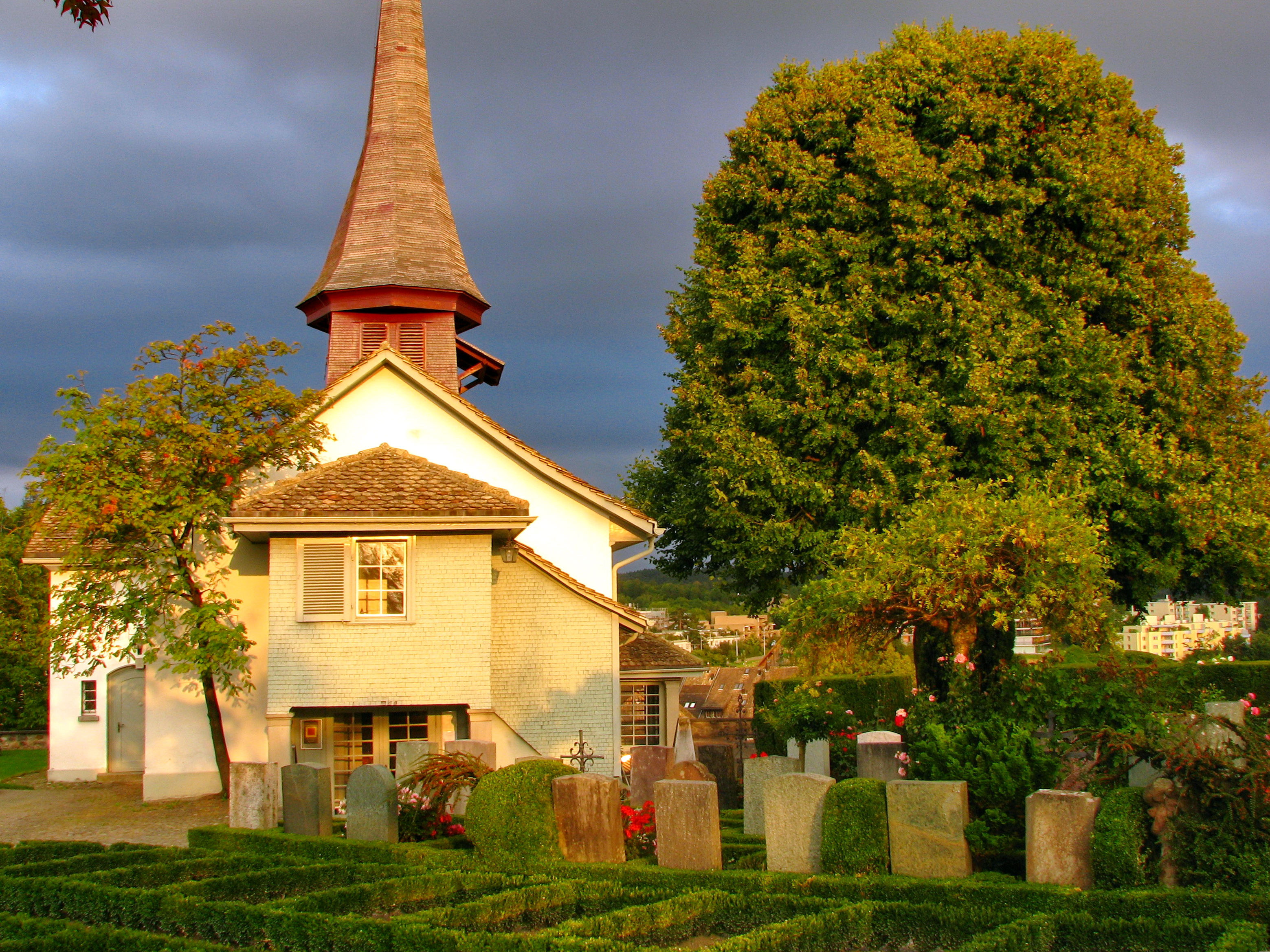 Alte Kirche (Old church) in Zürich-Witikon (Switzerland)